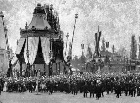 Az ezredéves kiállítás megnyitása